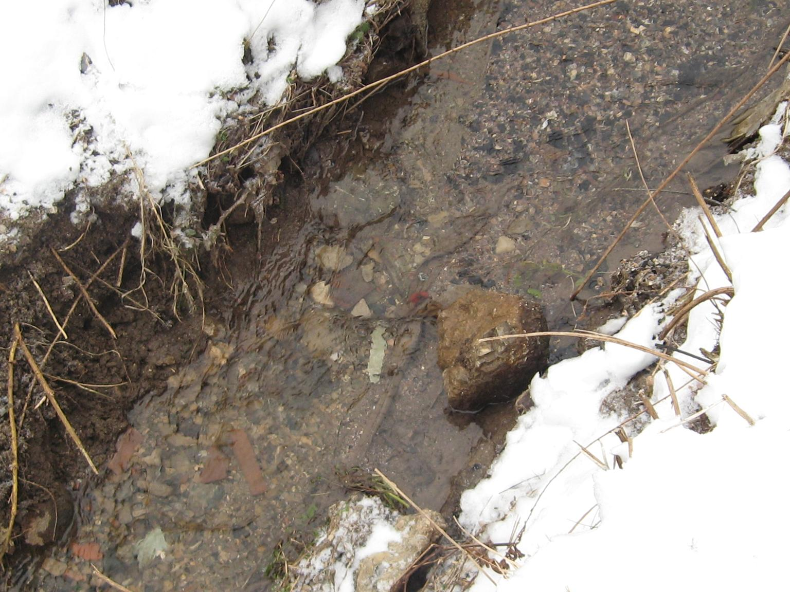 Поток зими. Драган Цветковић, сопствена слика.